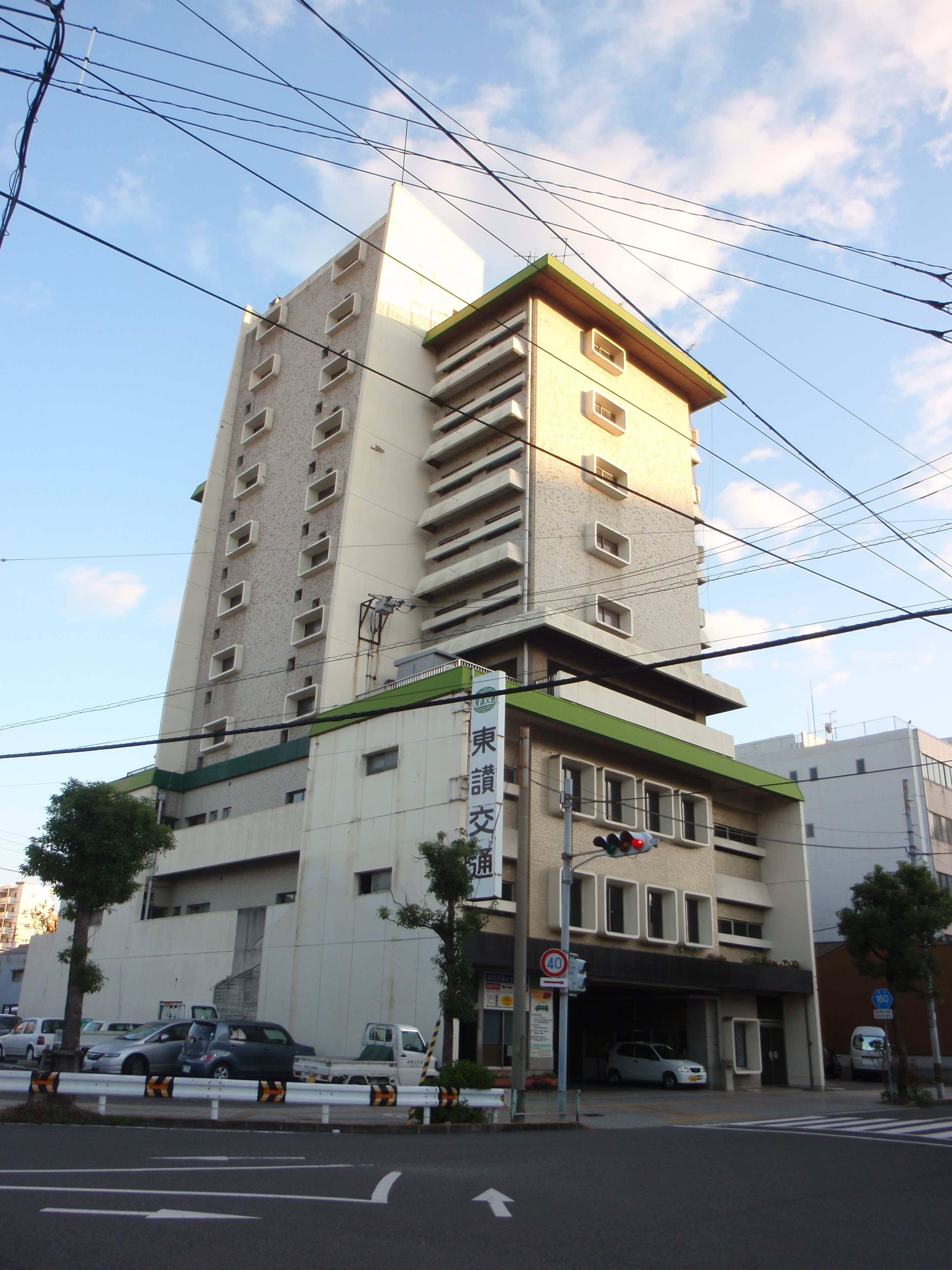 香川県高松市通町にある東讃交通株式会社の本社。